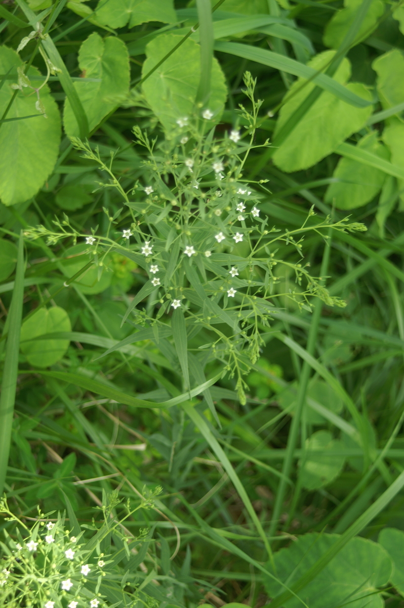 Bavarska lanika na Polhograjski Grmadi.